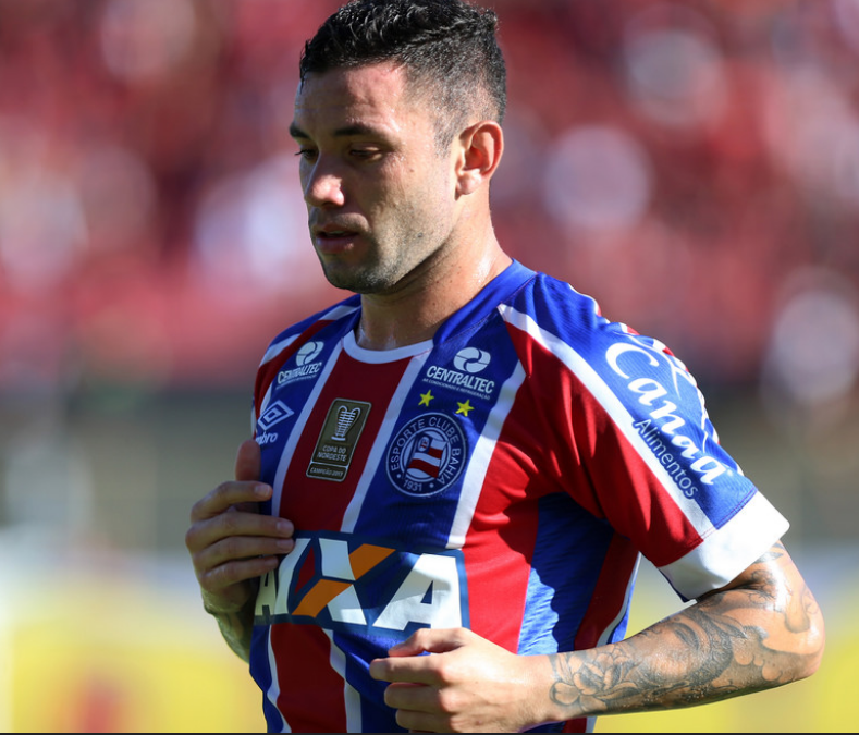 Mena vs Vitoria 18/02/2018